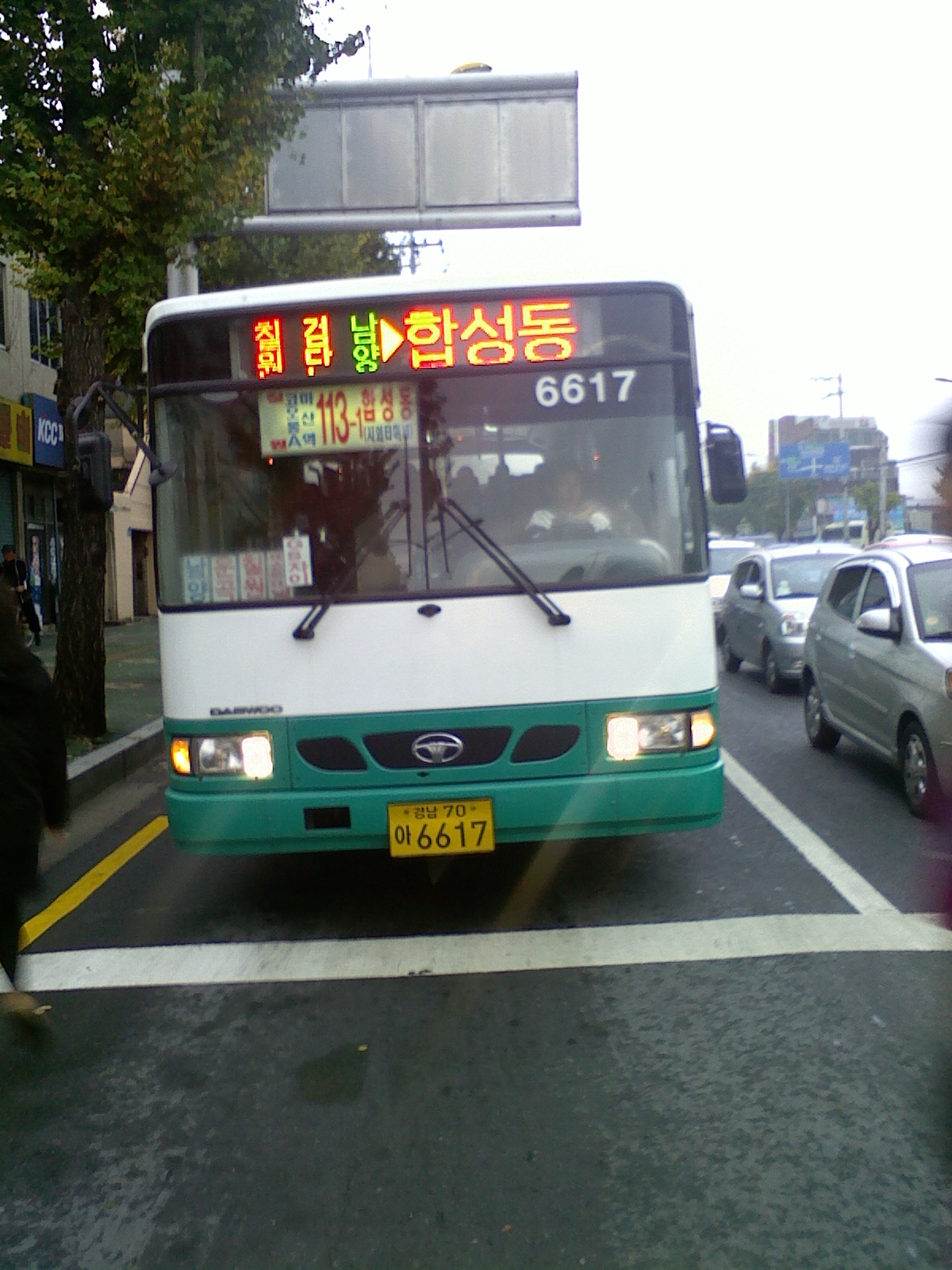 마산 함안을 오가는 동일고속 소속 113-1번 농어촌 버스, 마산시 석전2동 북성초등학교 버스 정류장 주변 횡단보도에서 촬영